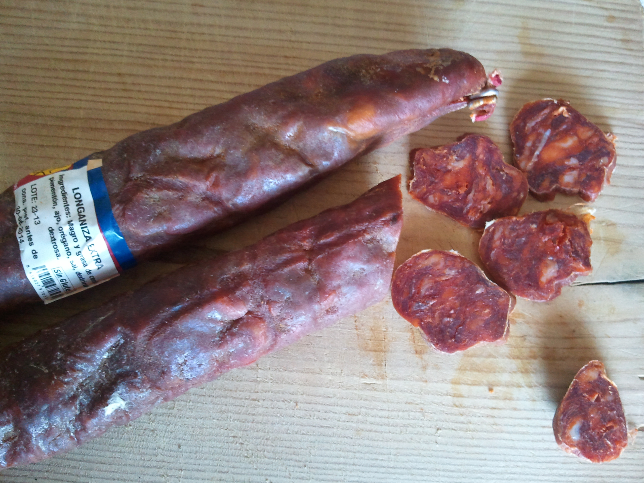 Longaniza de Ávila, España.